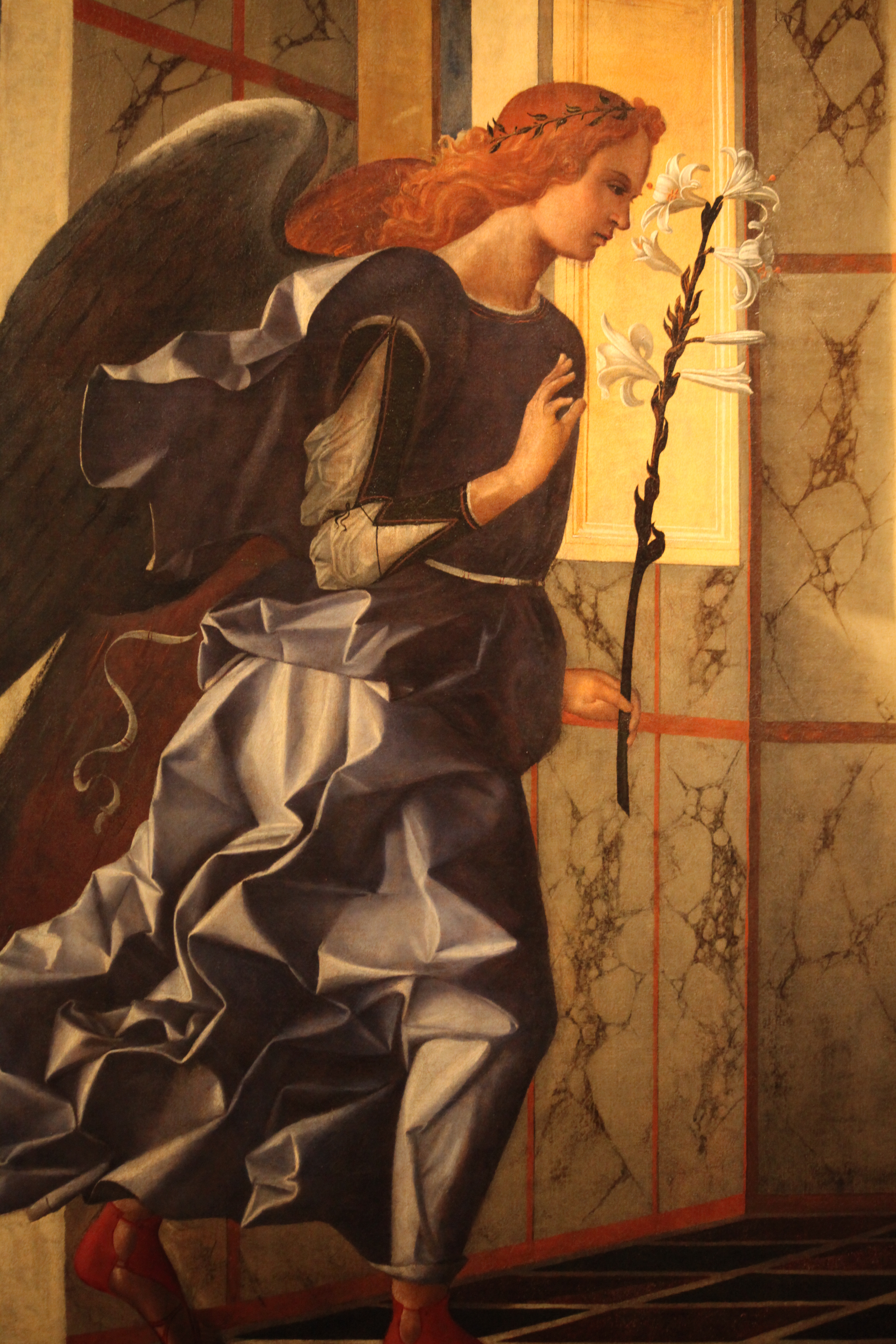 Gallerie dell'Accademia - MIBAC This is a photo of a monument which is part of cultural heritage of Italy.